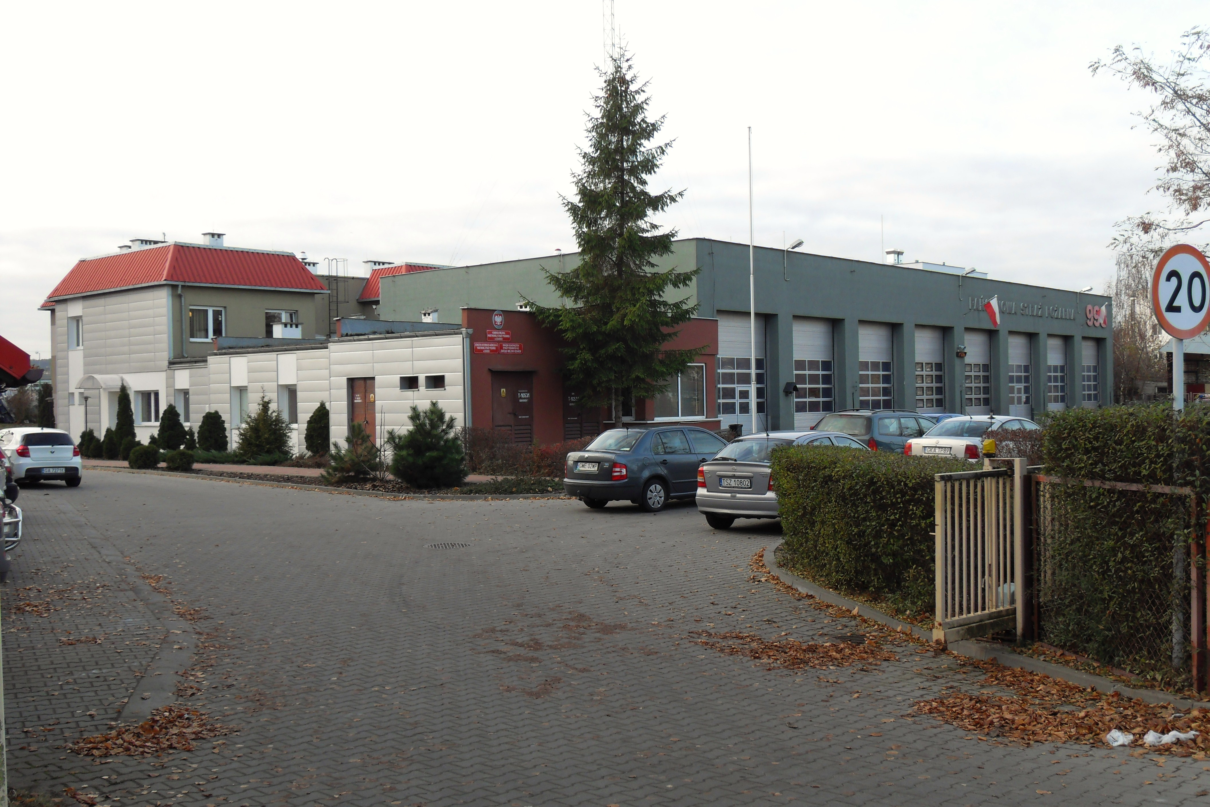 Gdańsk Przymorze Małe. Ul. Beniowskiego 7, Komenda Miejska Państwowej Straży Pożarnej w Gdańsku.